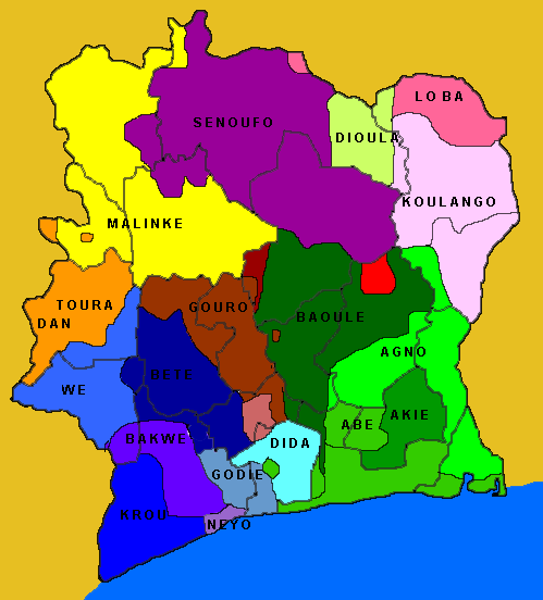 Les plus grands Ethnies de Côte d'Ivoire; wichtigste Ethnien in Elfenbeinküste: In Grün die Kwa-Völker, in gelb und gelbgrün die Mandevölker, in orange die Southern Mande, in blau die Kru-Völker und in lila die Volaic-Gur-Völker